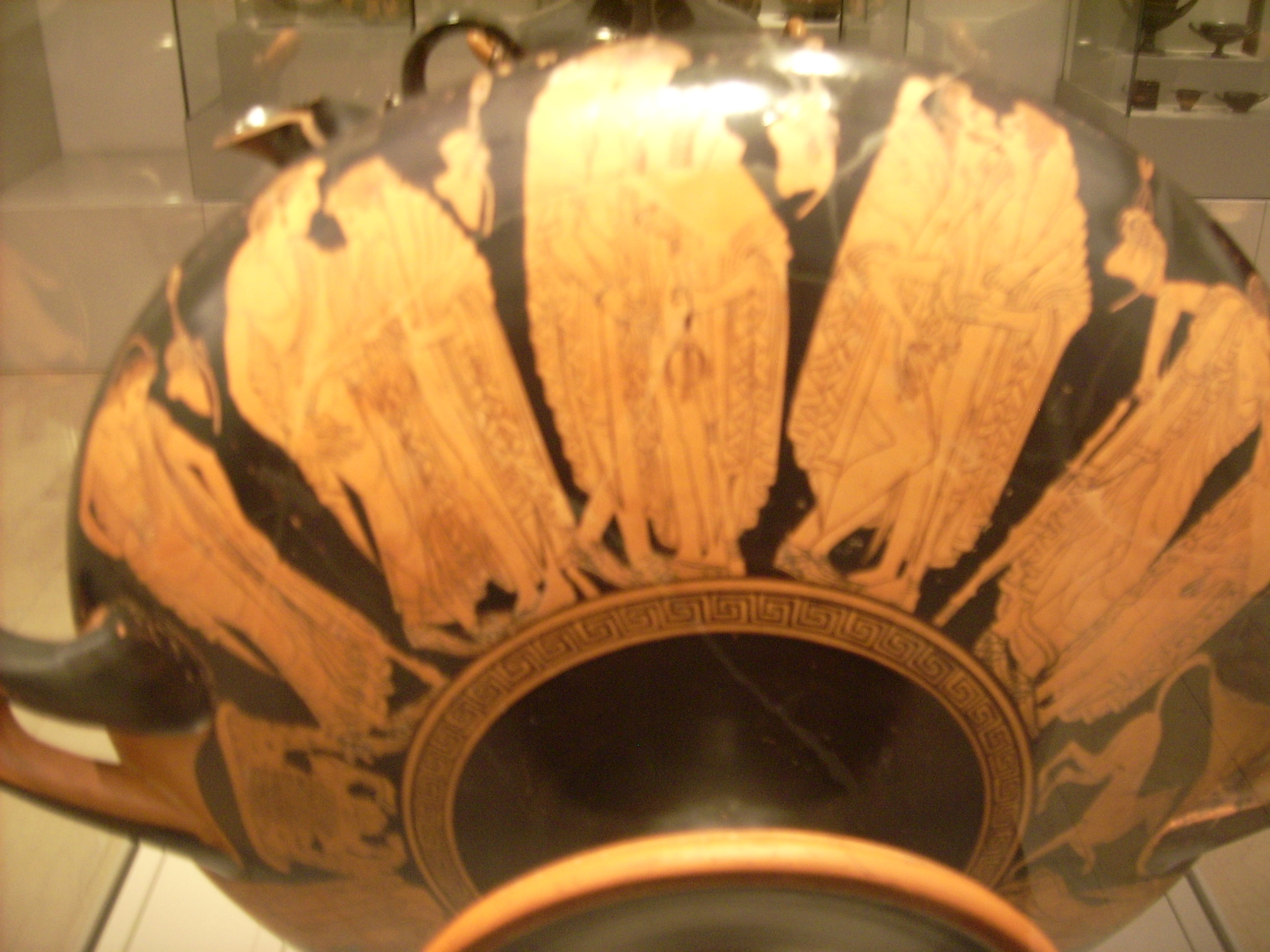 Antikensammlung Berlin/Altes Museum